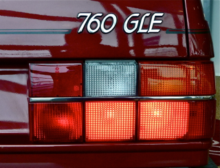 Volvo 760 GLE, bakljus på sedanmodellen och de första årens typsnitt på modellnamnet, Volvo Museum Arendal